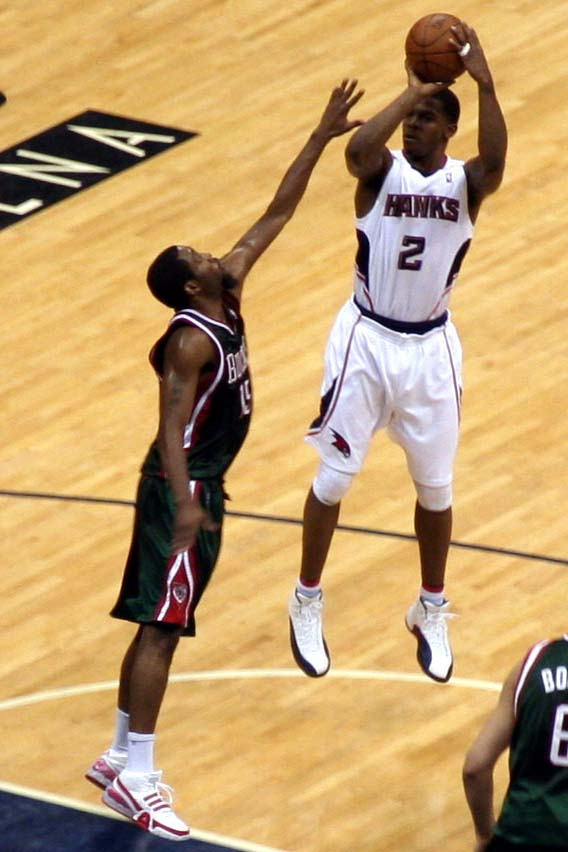 Hawks v Bucks 02